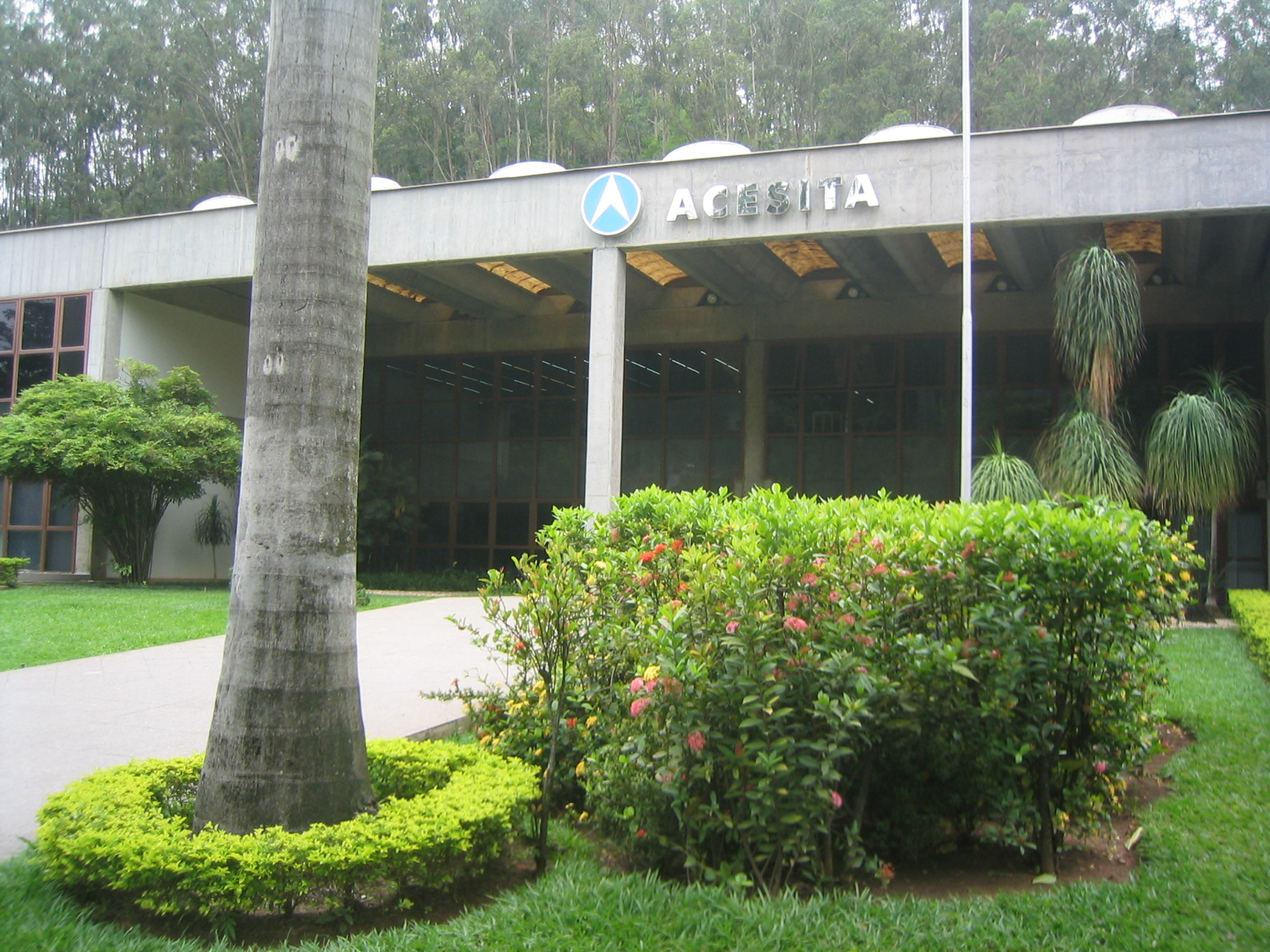 Hauptgebäude der Acesita in Timoteo